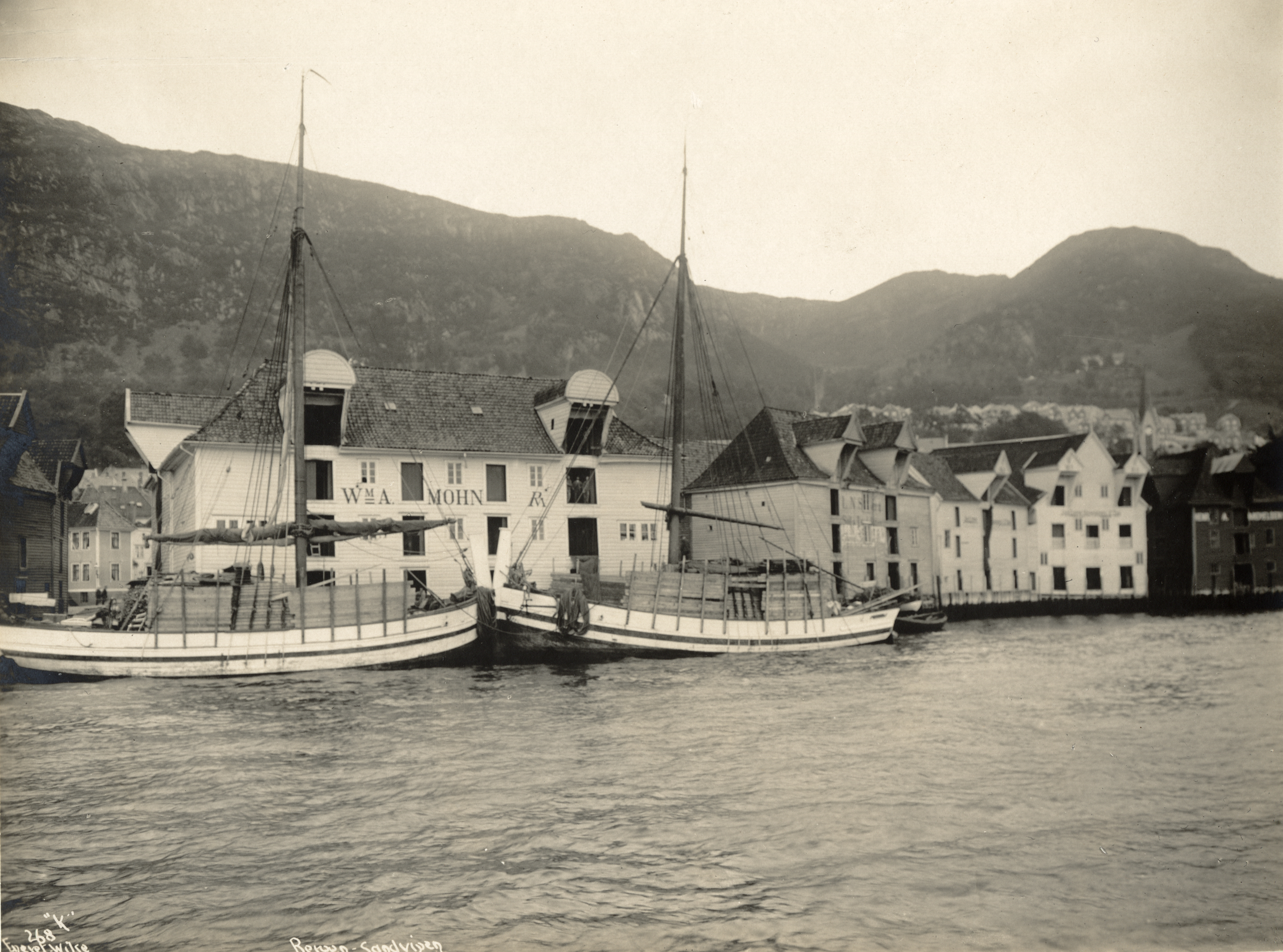 Sandviksboder i Bergen, Hordaland 268. Eneret Wilse